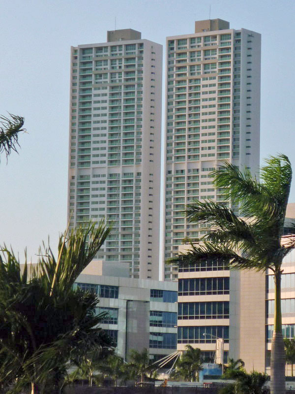 Torre Sevilla, Ciudad de Panamá, Panamá.